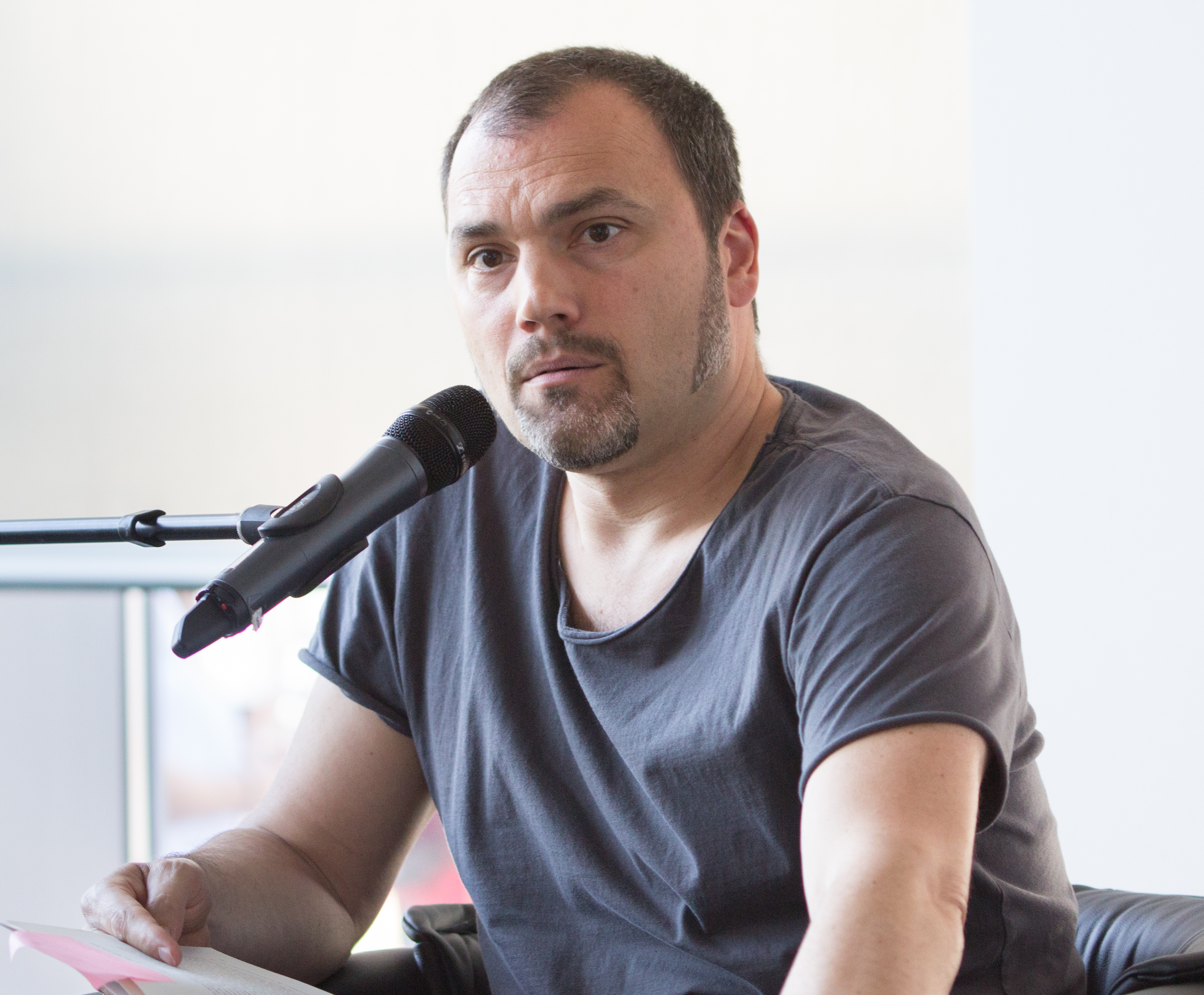 Danko Rabrenović liest aus seinem Buch „Herzlich Willkommenćić“, Foyer des Bastei Lübbe Verlags während des Birlikte-Festivals in Köln-Mülheim 2015